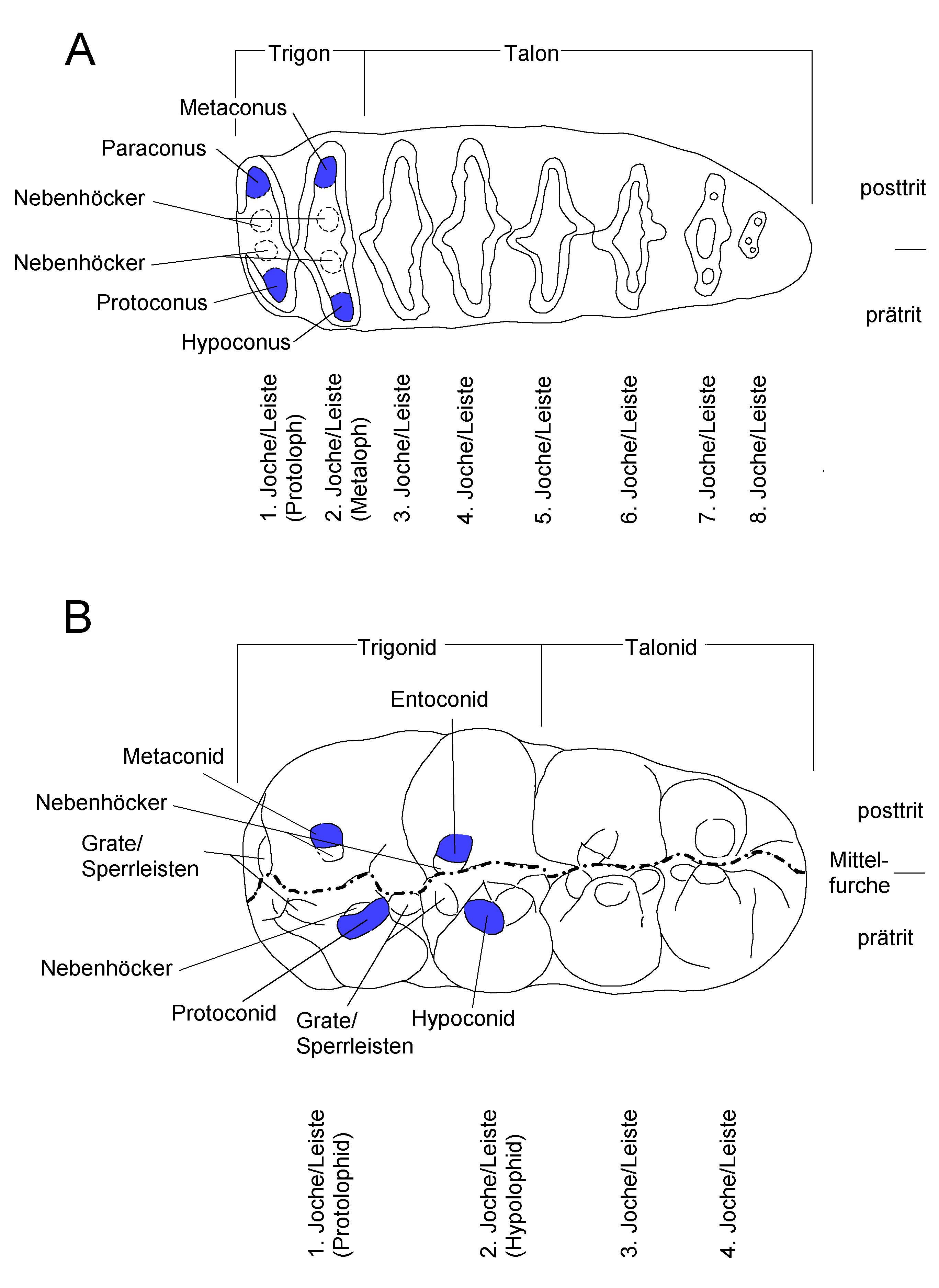 Vergleich der Rüsseltierzähne mit Bezeichnungen wichtiger topographischer Punkte; A: oberer linker dritter Molar von Loxodonta; B: unterer rechter dritter Molar von Gomphotherium